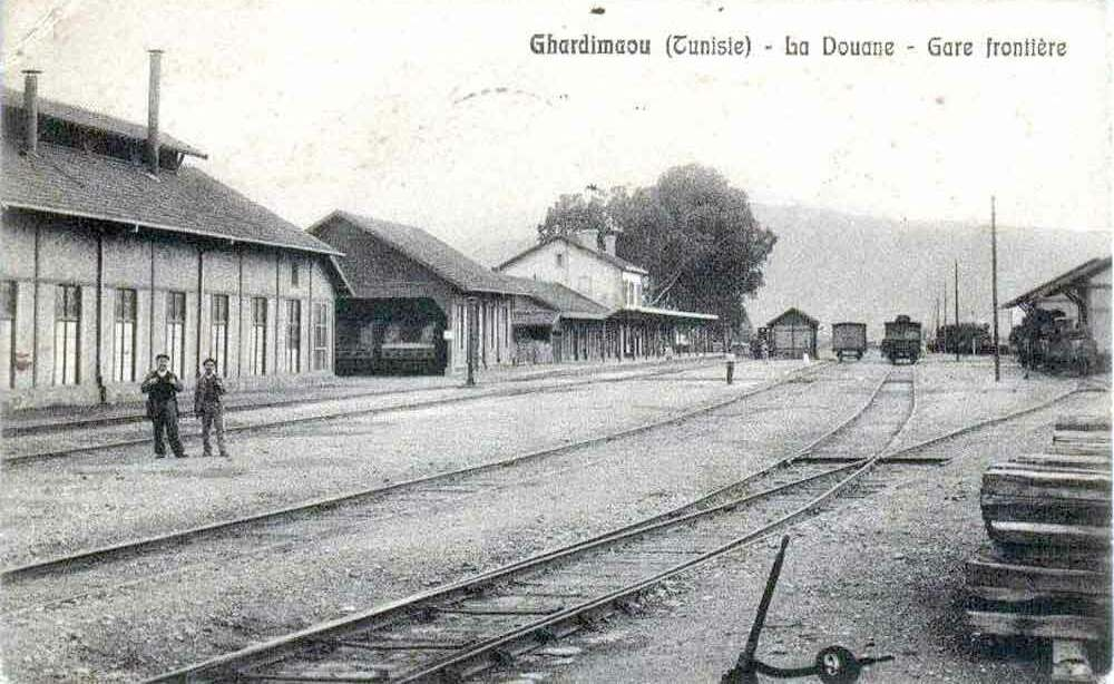 La gare de Ghardimaou. Bertrand Bouret - Collection privée